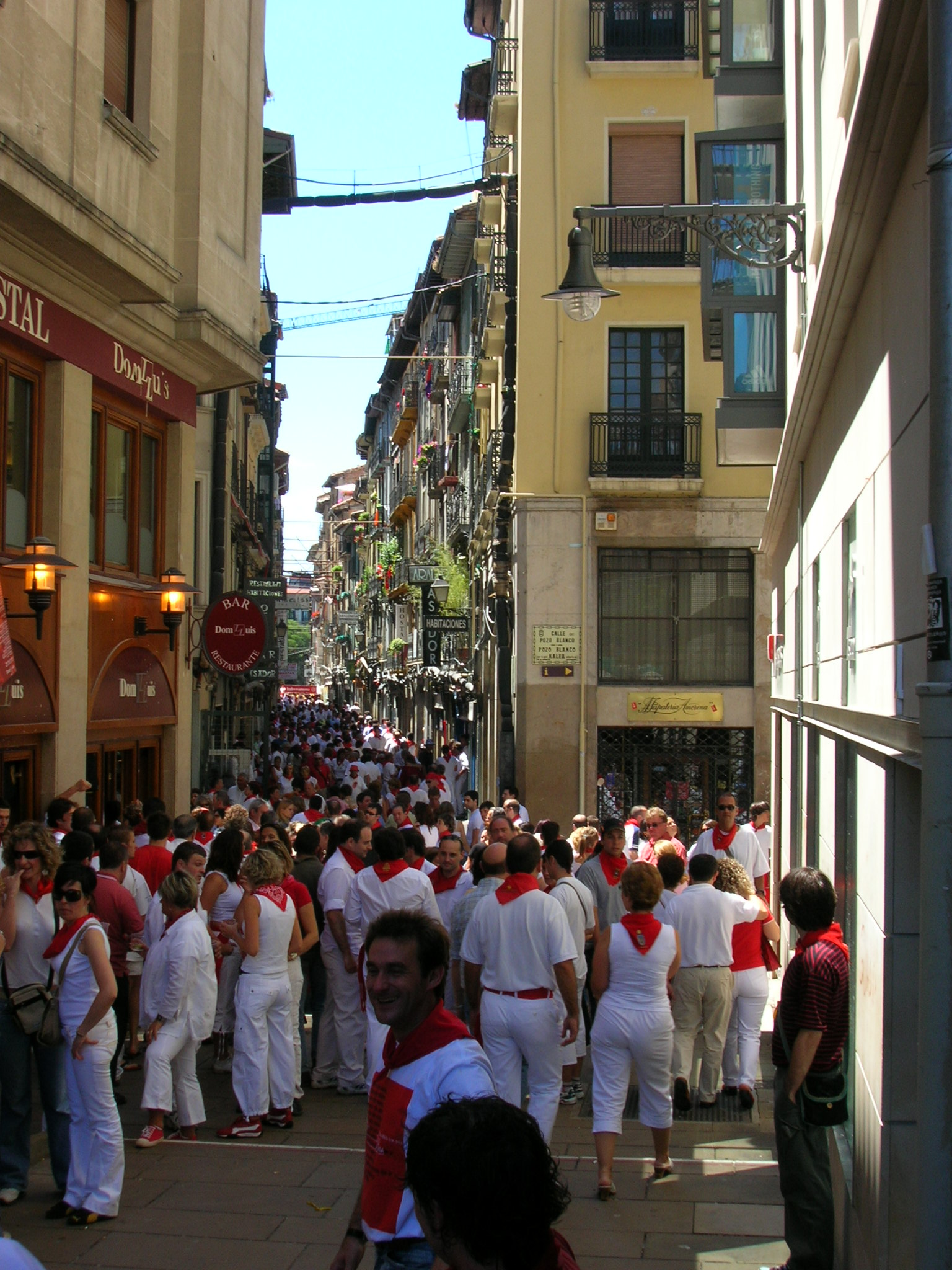 Imagen del ambiente sanferminero de la Calle San Nicolás en la confluencia con la Plaza del Castillo